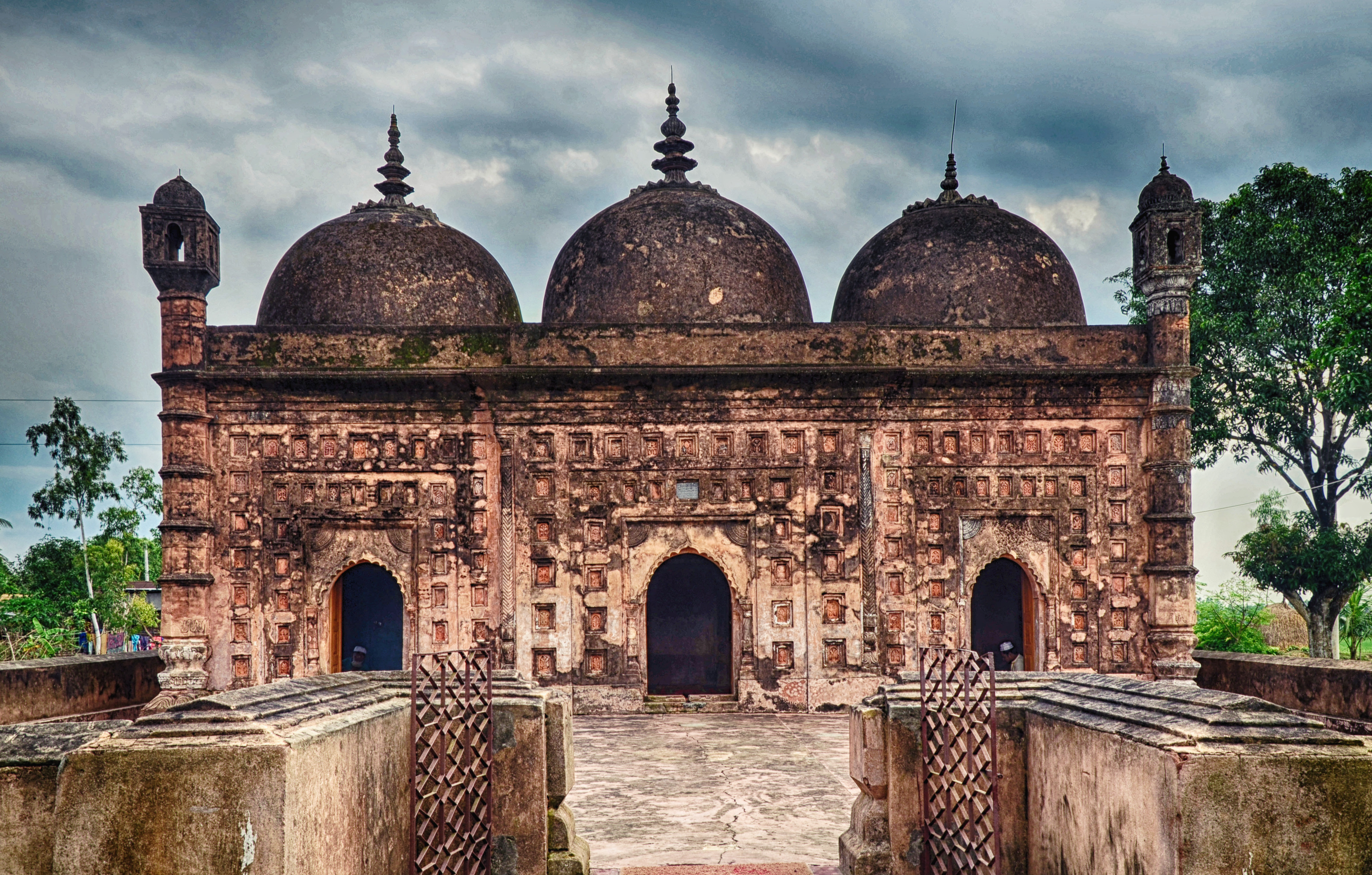 প্রাচীন মসজিদ (নয়াবাদ)